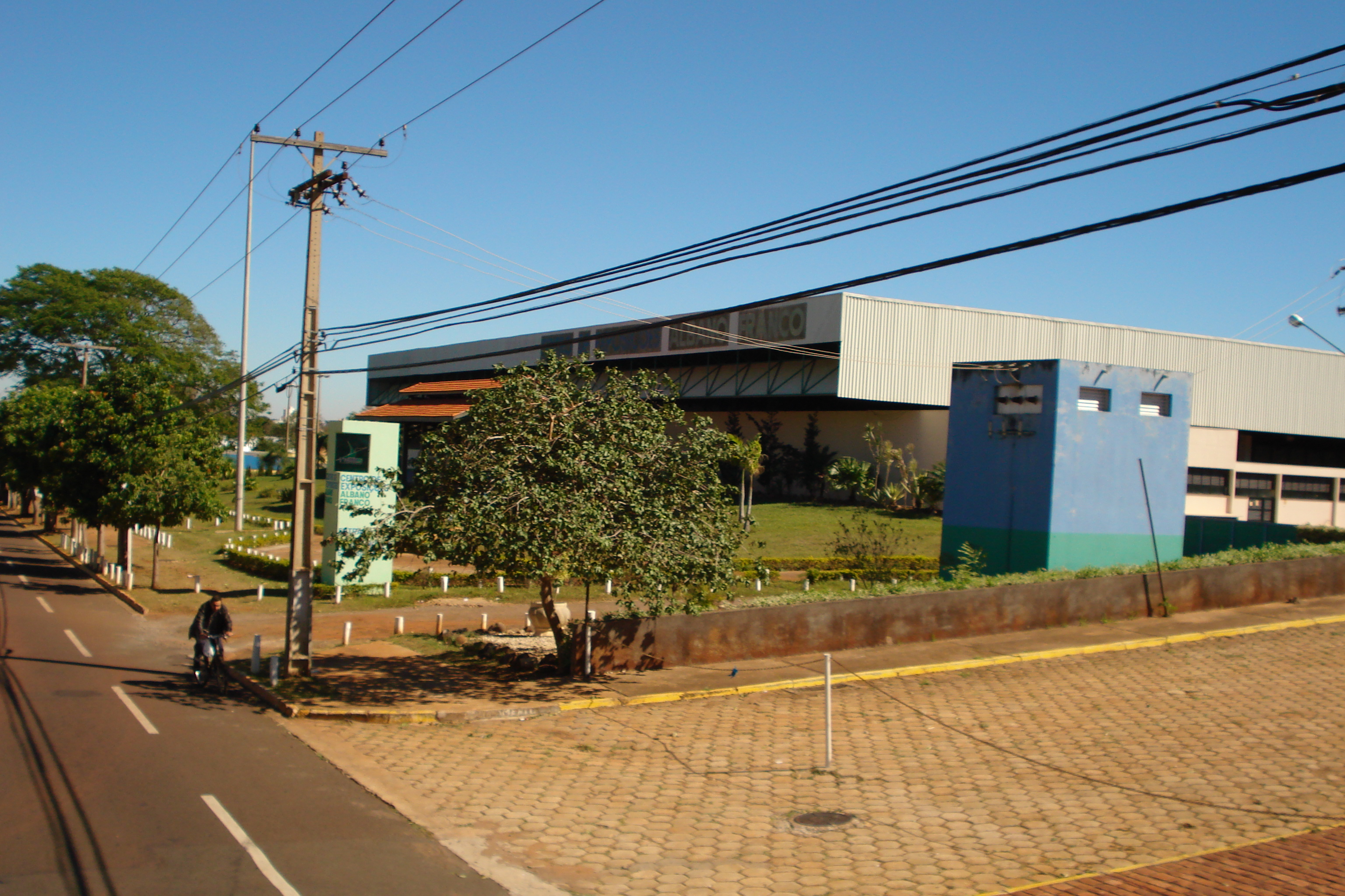 Events Center Albano Franco